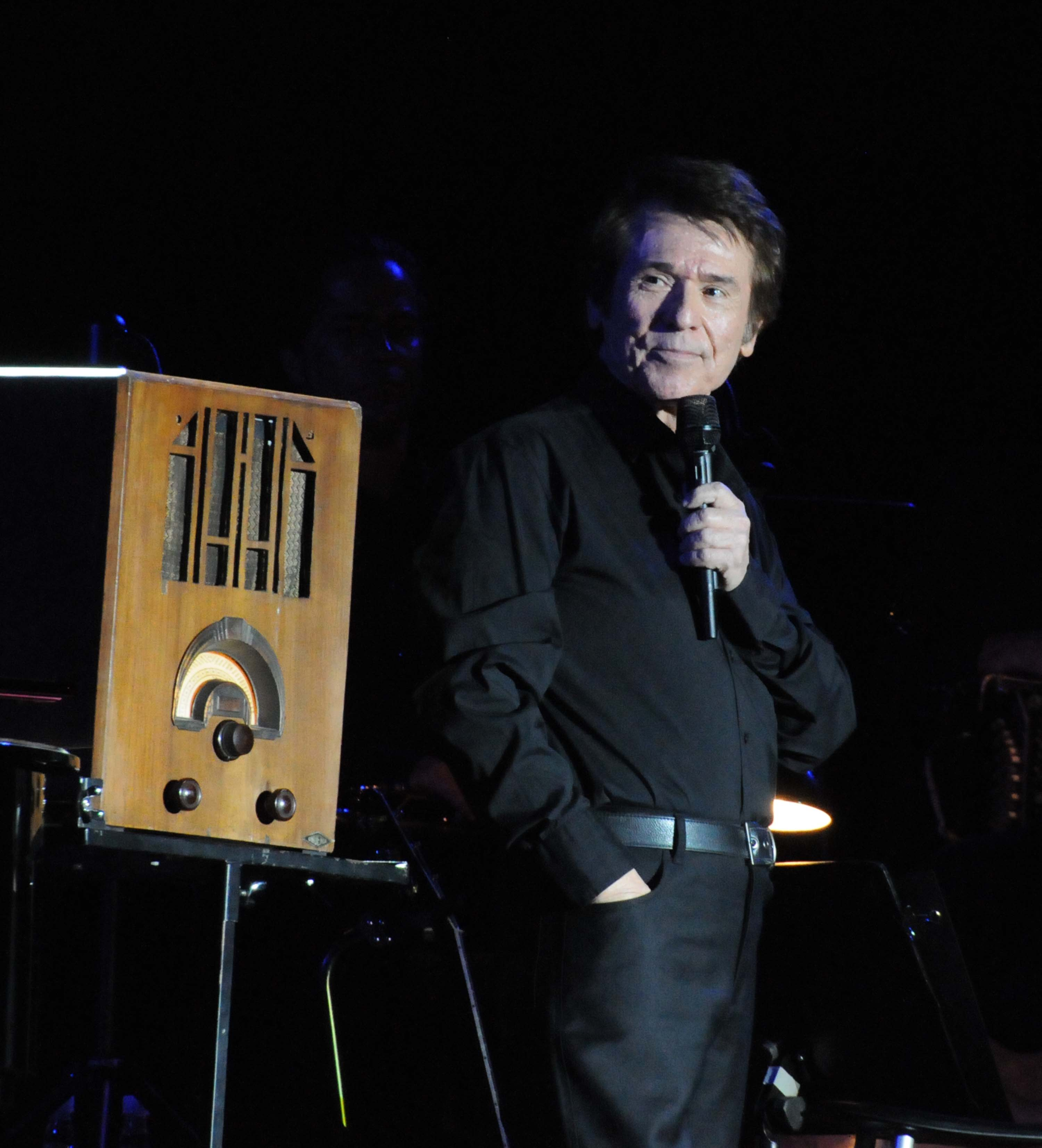 Fotografía gentileza de Patricio González.